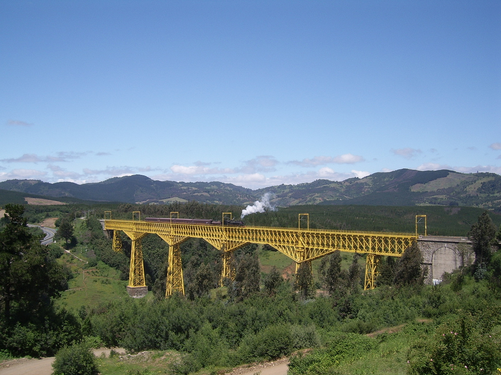 Viernes 27 Noviembre 2009. El Tren de la Araucanía, a su paso por el Viaducto del Malleco, llegando a Collipulli procedente desde Temuco.